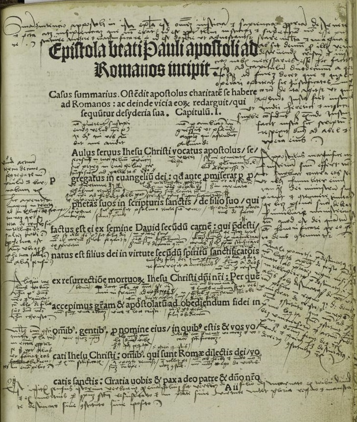 Luther Römerbriefvorlesung Mitschrift Reichenbach